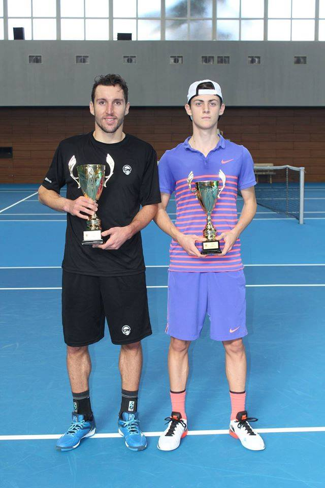 Vasko Mladenov y Alex Lazarov